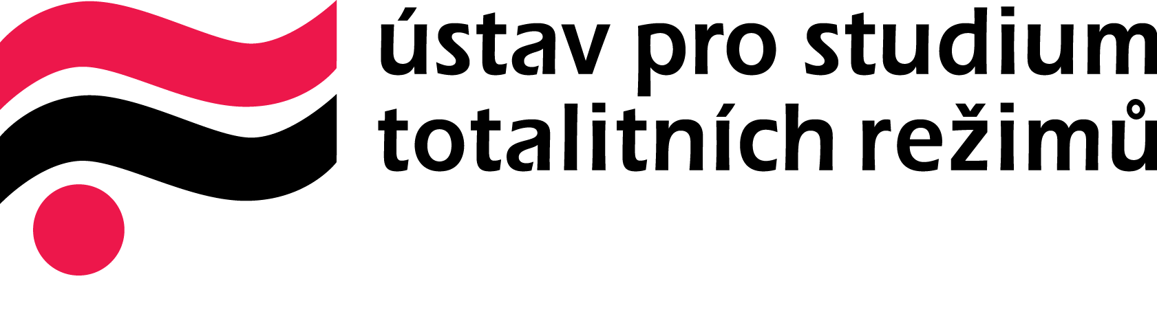 Logo ÚSTR